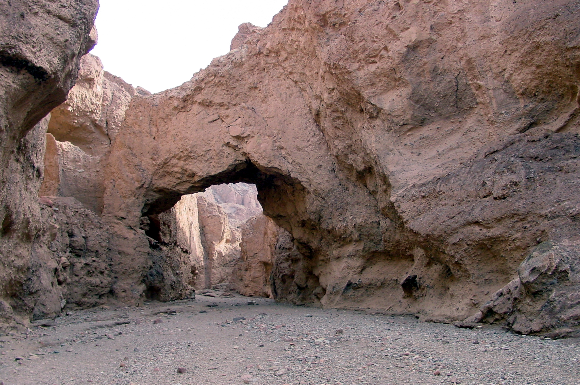 Arche naturelle située dans le parc national de la Vallée de La Mort, conté de San Bernardino, état de la Californie, États Unis d'Amérique.